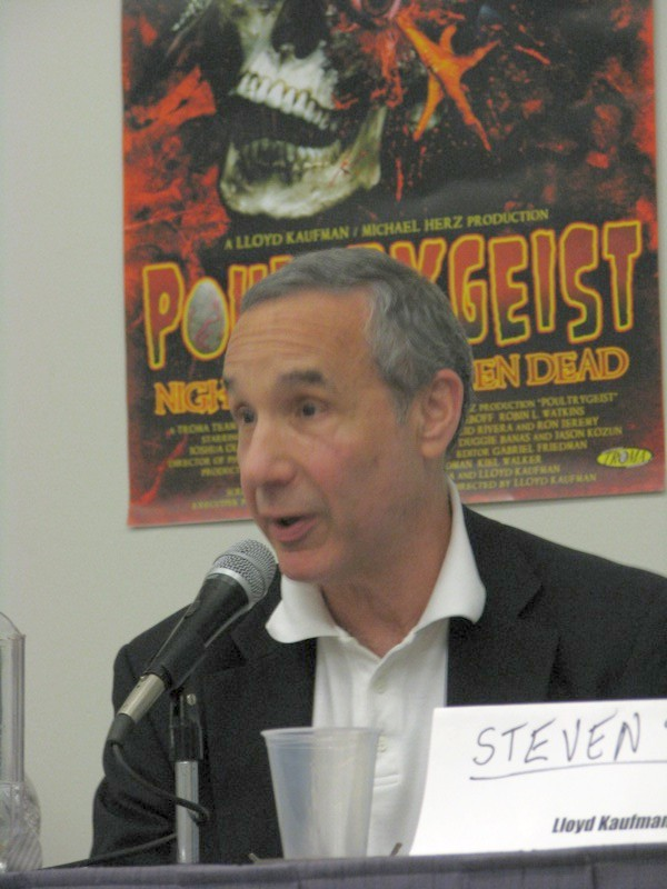 La cabeza de estudios Troma, creador del Toxic Avenger